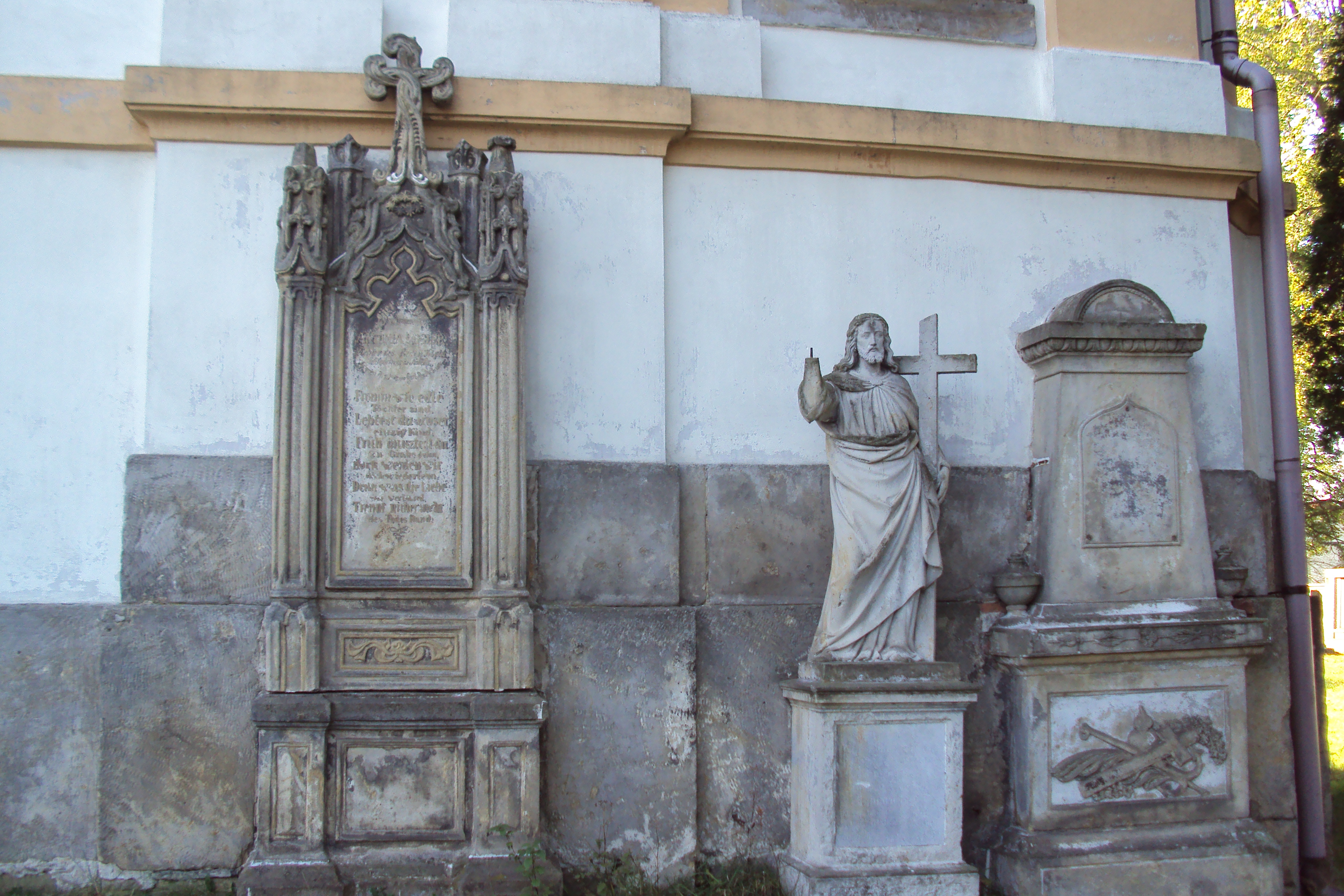 Náhrobky u kostela v Kytlicích, součást hřbitova